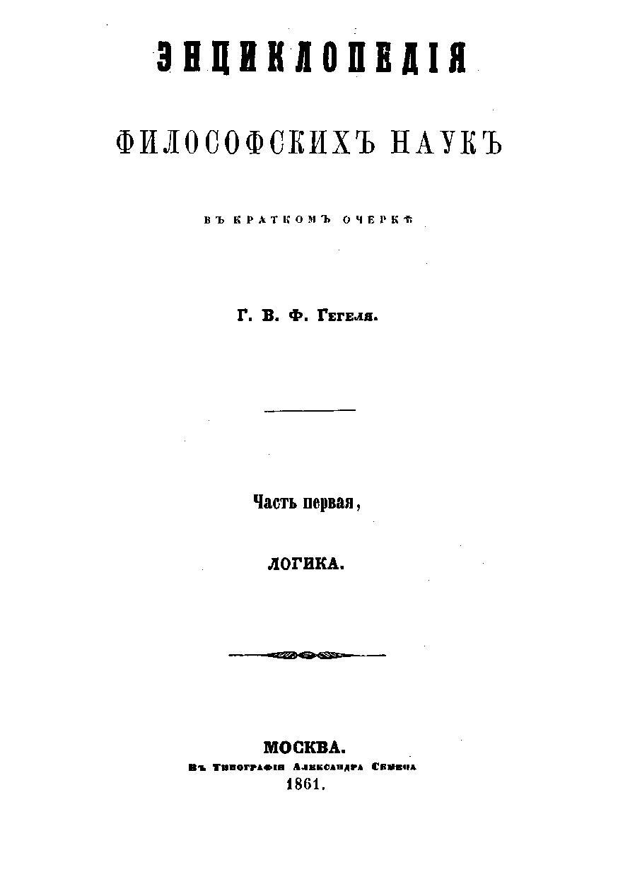 Титульный лист первого русского перевода «Энциклопедии философских наук» Гегеля